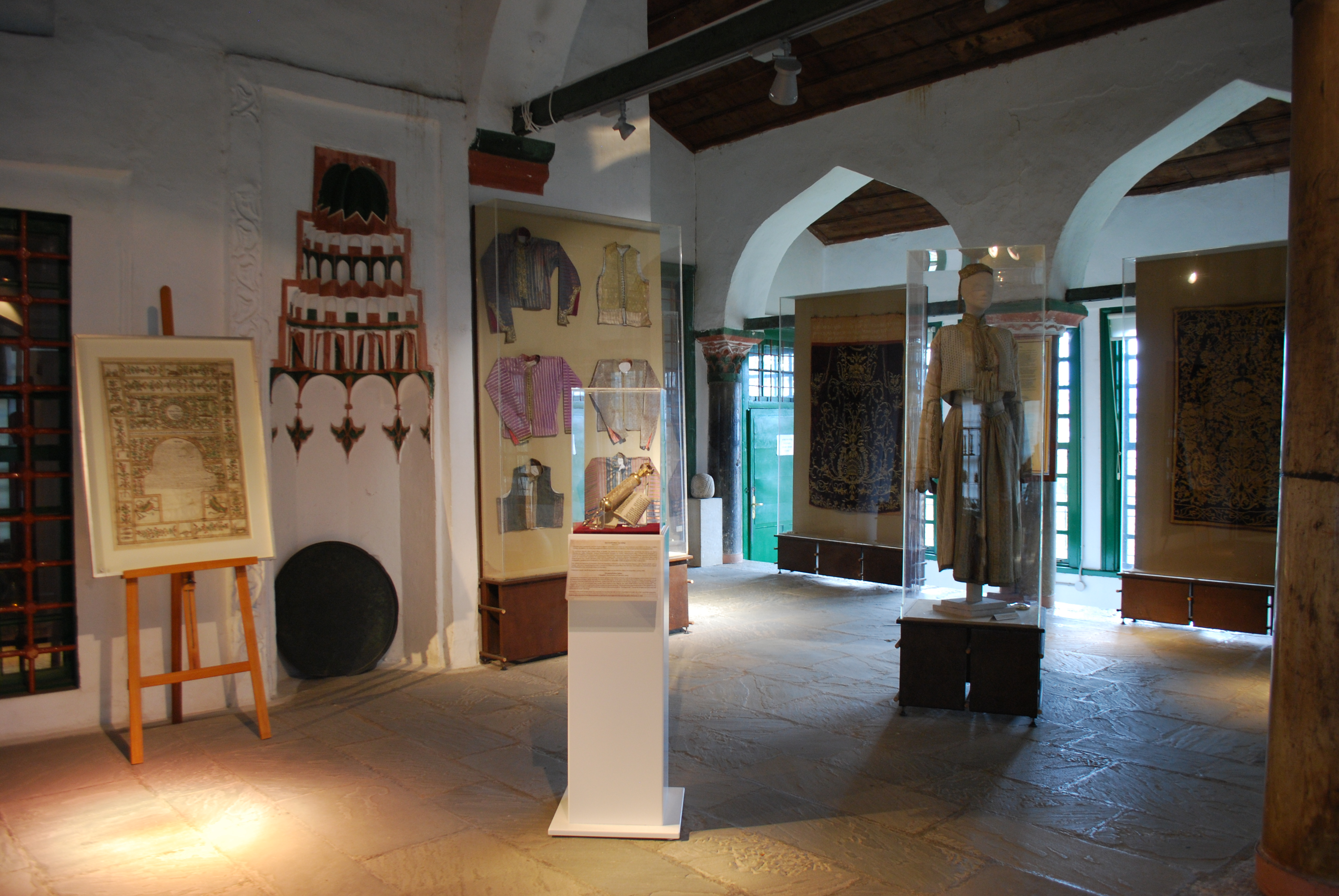 Vue de Ioannina, en Epire.